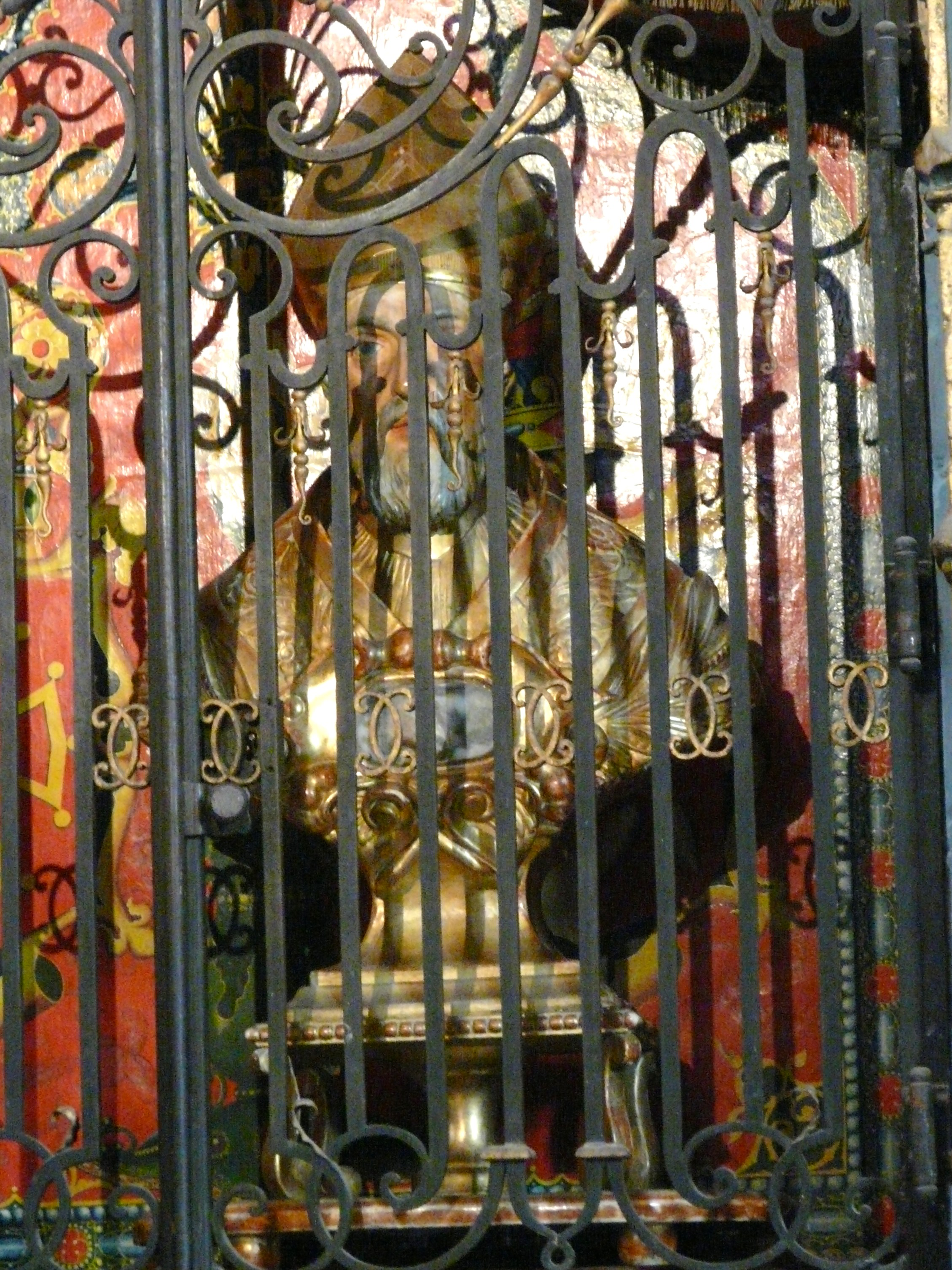 Le buste de saint Bertrand, panneau central du tombeau de saint Bertrand, cathédrale Notre-Dame, Saint-Bertrand-de-Comminges, Haute-Garonne, France.